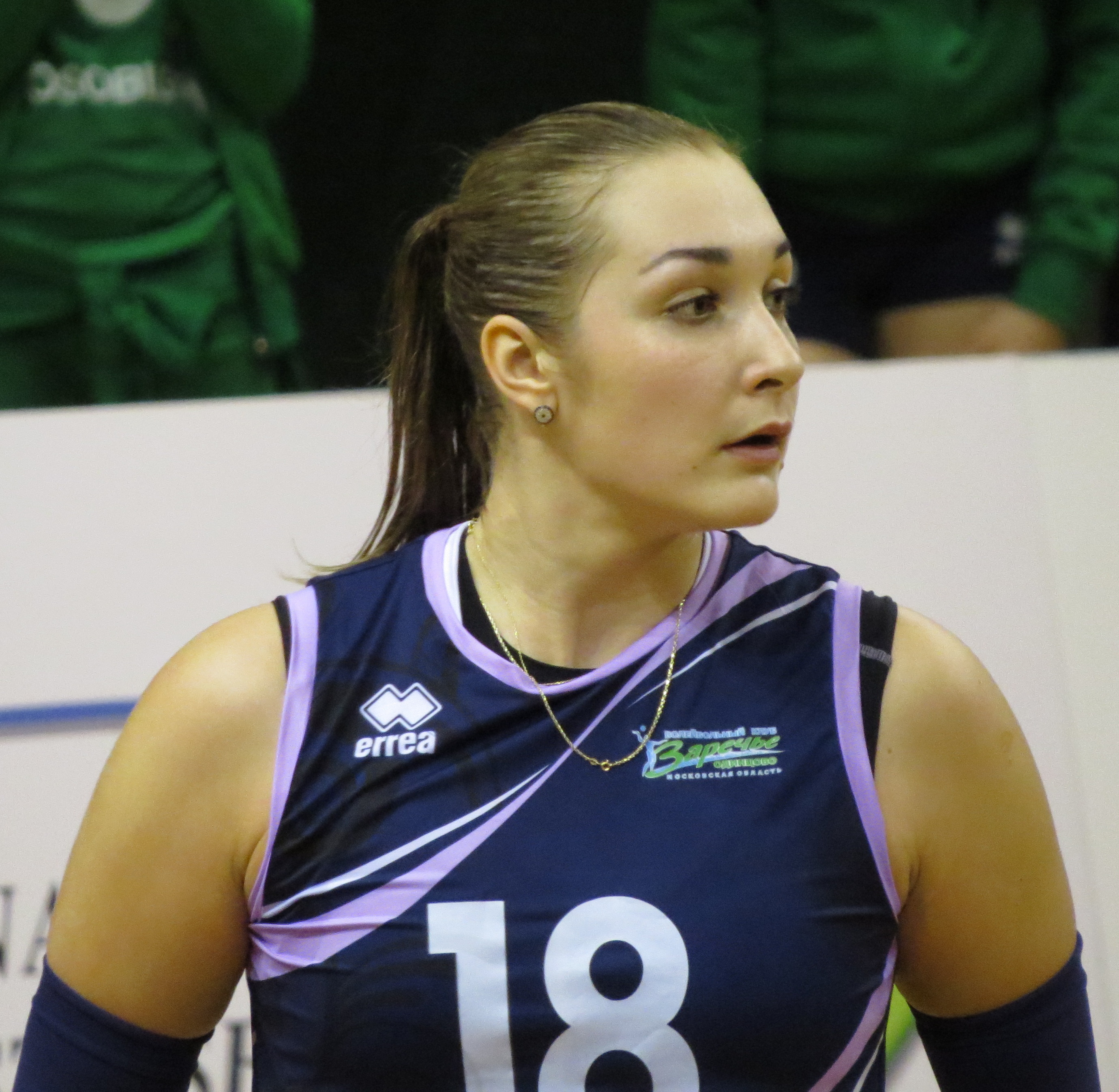 Match de Challenge Cup, quart de finale retour, entre le Stade Français et Odintsovo 18 : Irina Voronkova